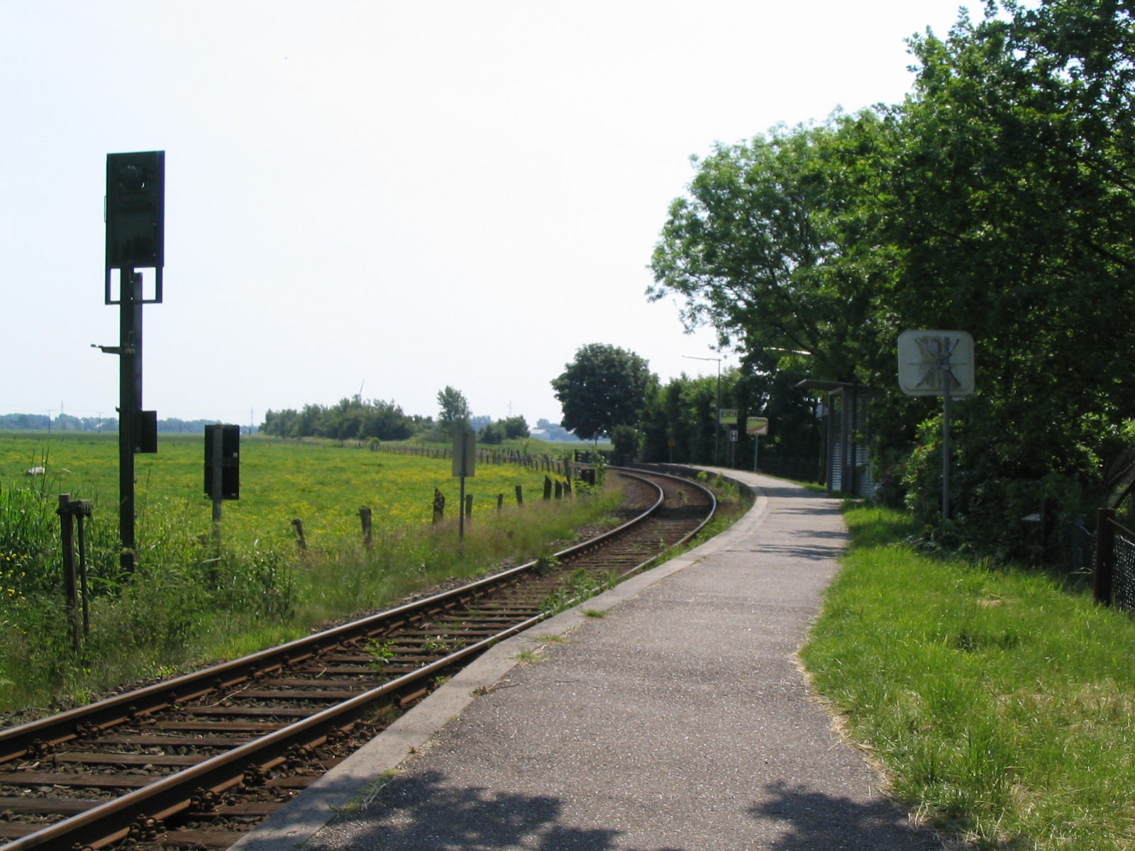 Train station Süderdeich